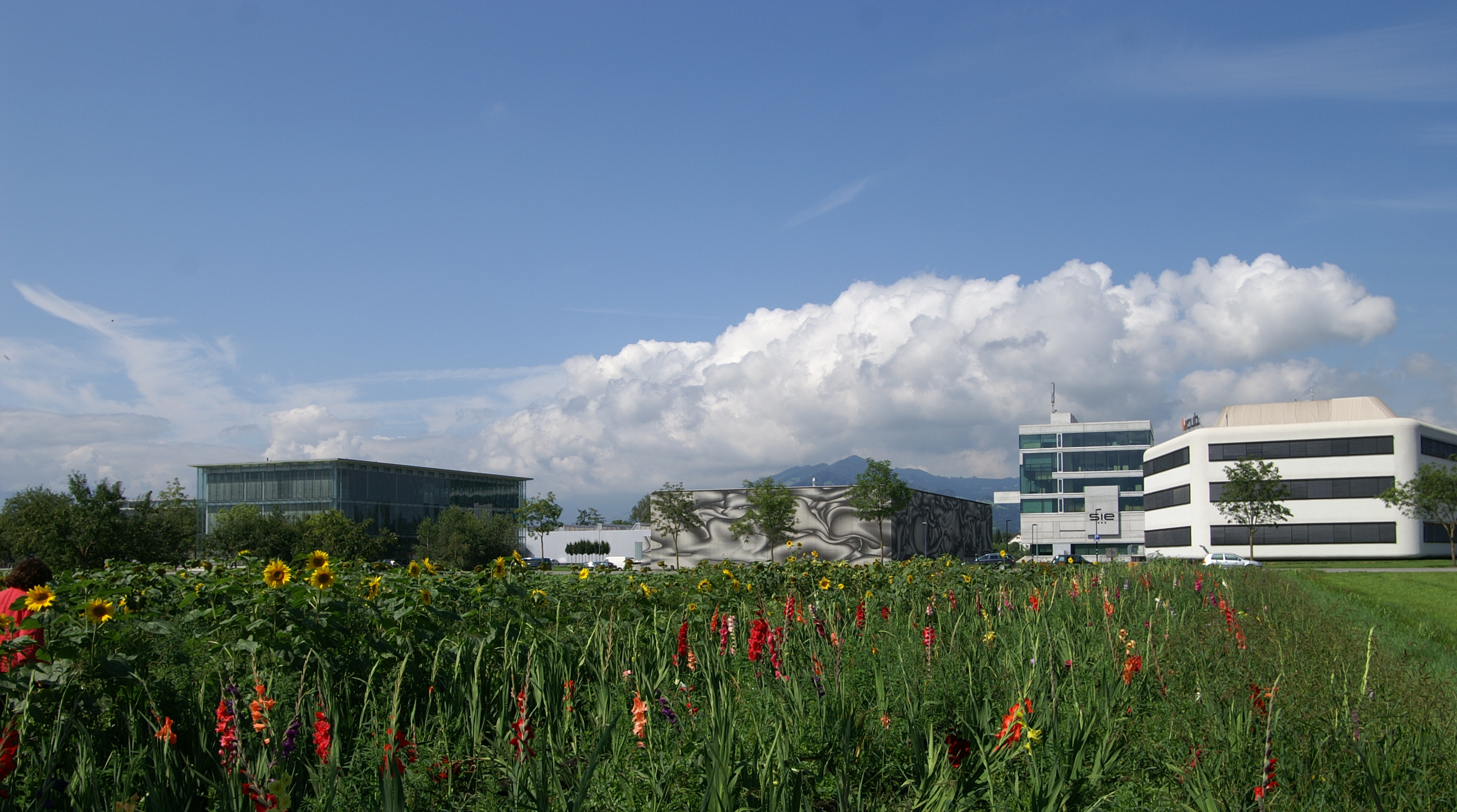 Millennium Park, in Lustenau, Vorarlberg